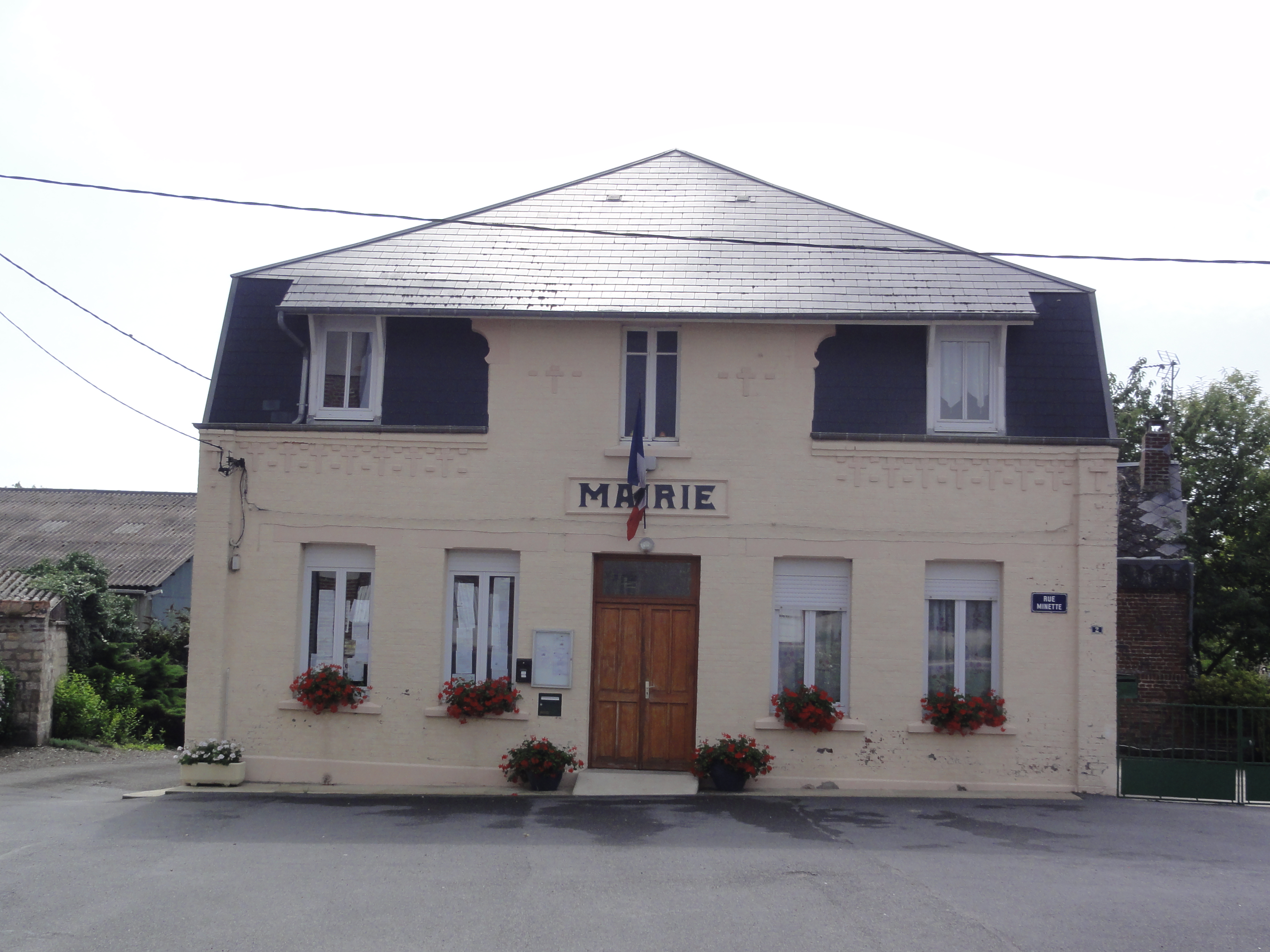 Hauteville (Aisne) mairie